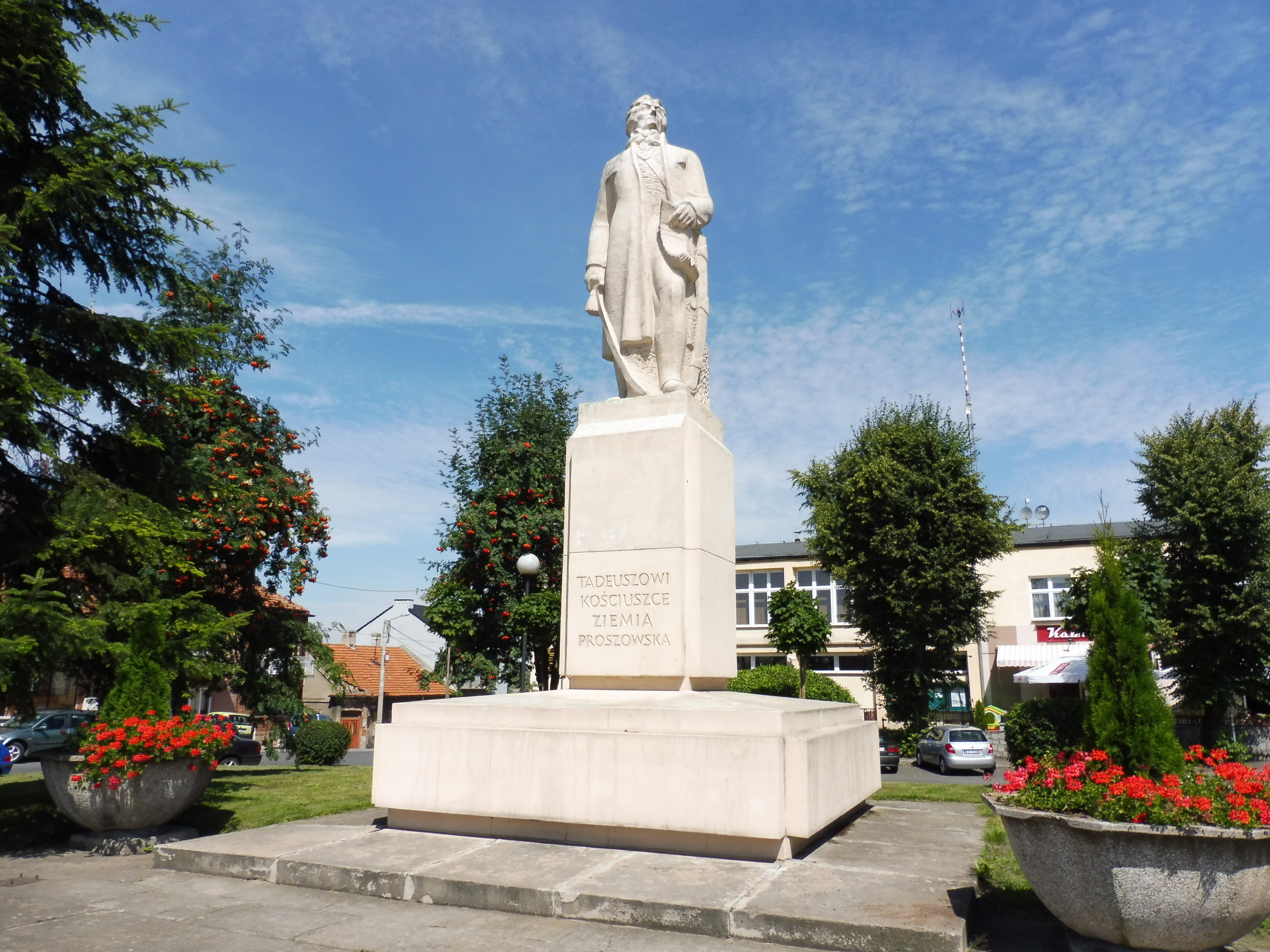 Proszowice - pomnik Tadeusza Kościuszki